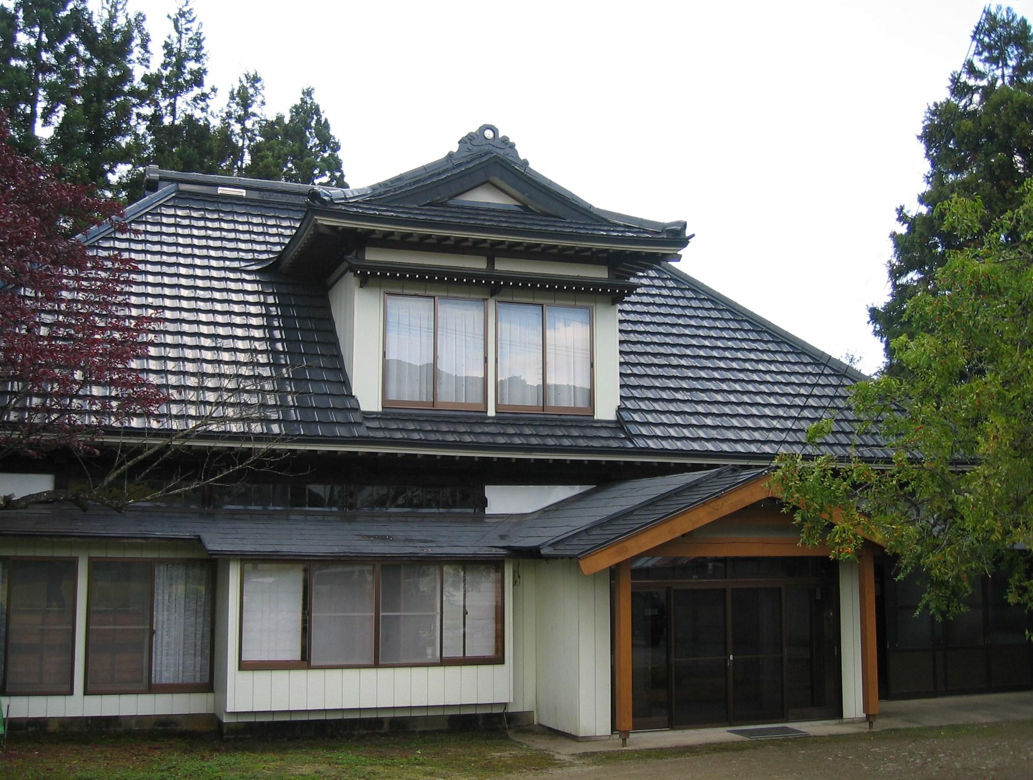 照国の生家（秋田県湯沢市秋ノ宮）